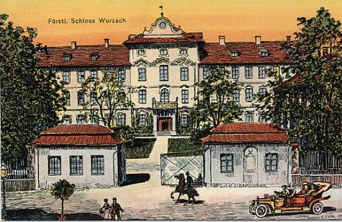 Eugen Felle: Wurzach, Fürstl. Schloss (Ansischtskarte), ca. 1900